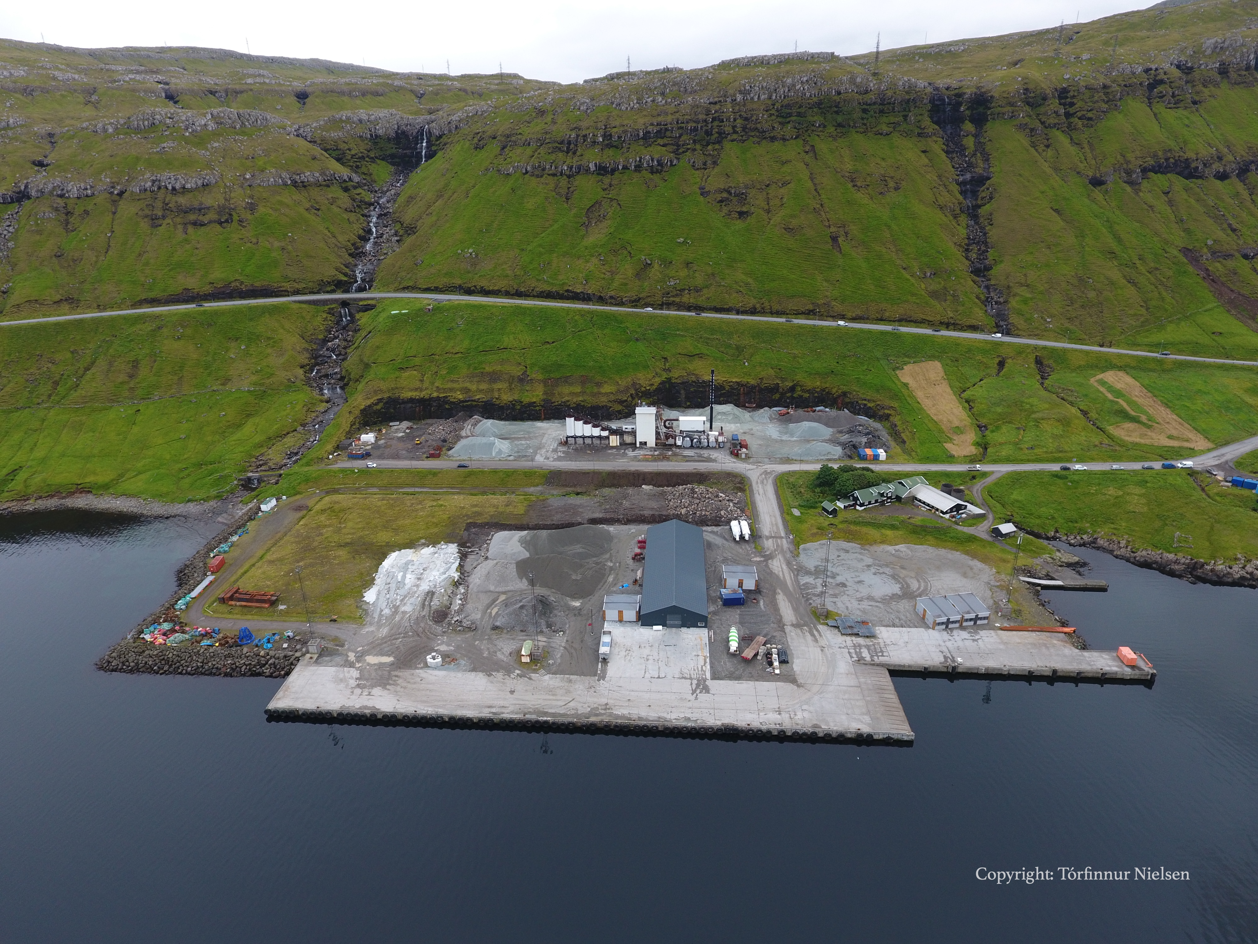 Luftfoto af Sund havn